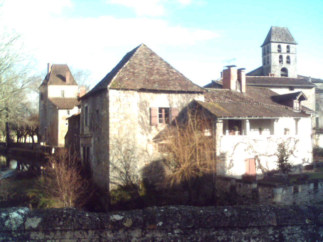 Vue de Saint-Jean-de-Côle, département Dordogne, France.